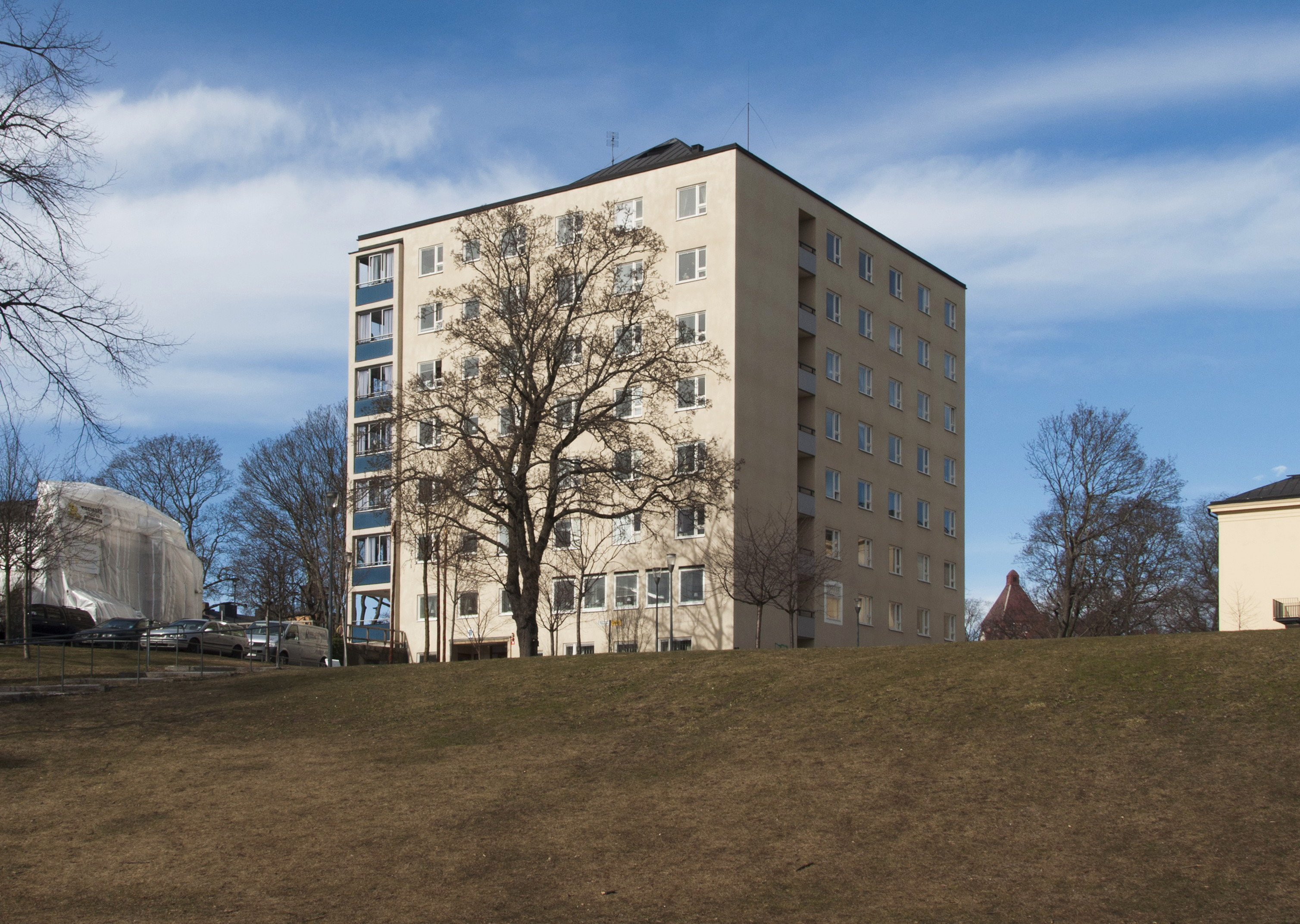 Grötlunken 2, Eastmansvägen 24-26, Nybyggnadsår 1949 - 1950, Byggt som pensionärshem ("Nya hemmet") Nils Sterner (Arkitekt) Tore Virke (Arkitekt) Sabbatsbergs Vård- och Ålderdomshem (Byggherre) Stockholms Stads Fastighetskontor Husbyggnadsavdelning (Byggmästare)